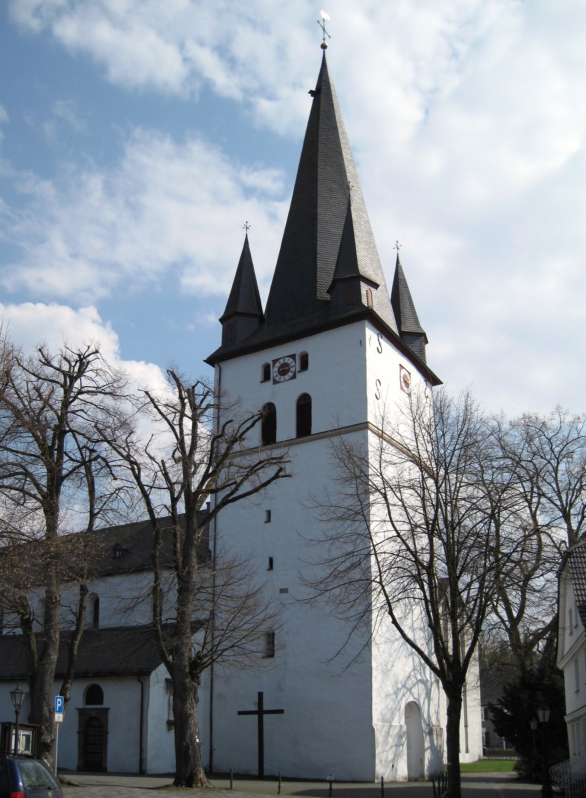 St.-Clemens-Pfarrkirche in Drolshagen. This image shows a heritage building in Germany, located in the North Rhine-Westphalian city Drolshagen (no. 1).